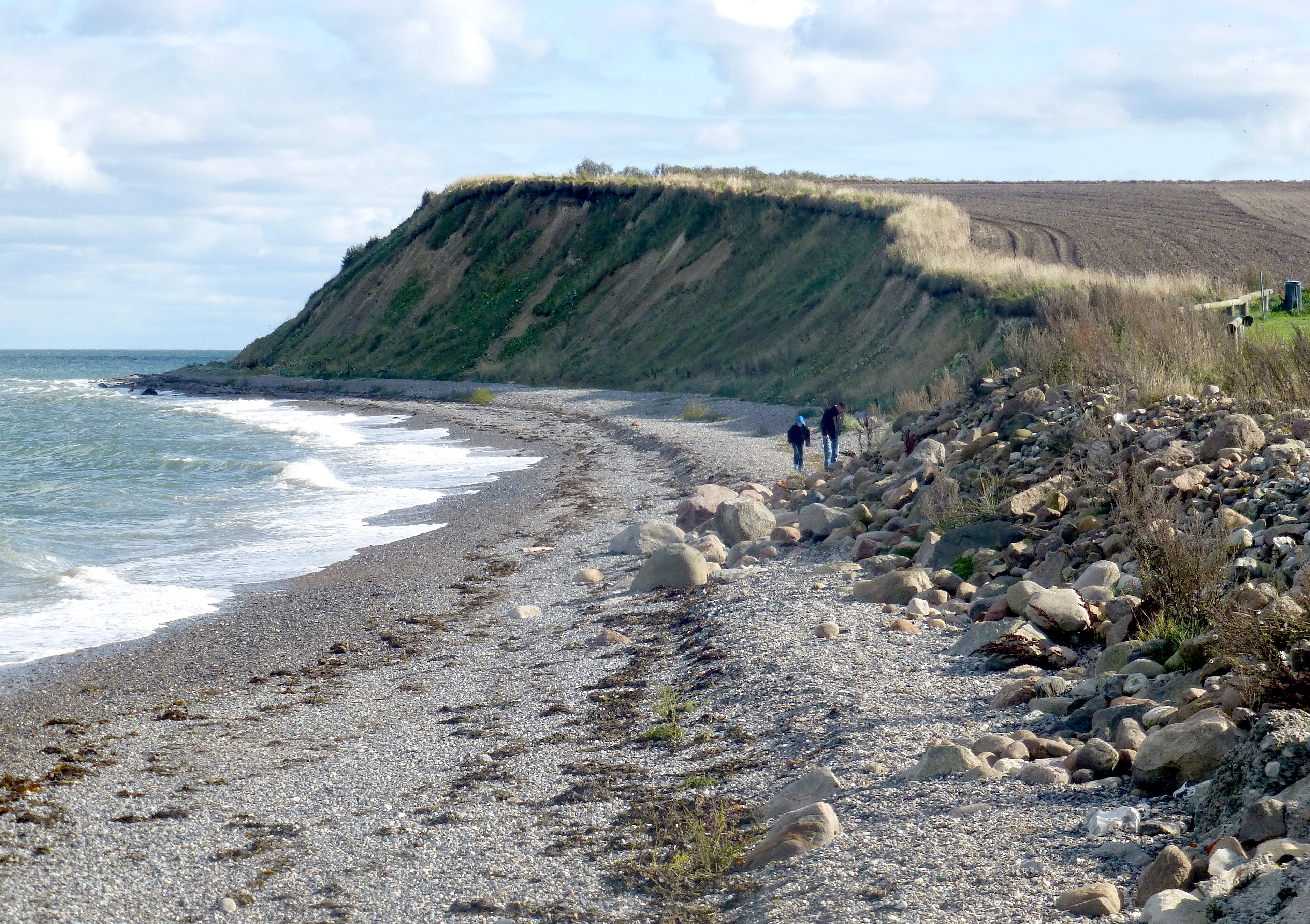 Gjerrild Klint fra set fra nord